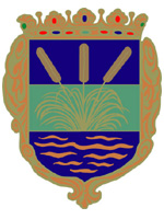 Wappen der Freistadt Rust / Burgenland